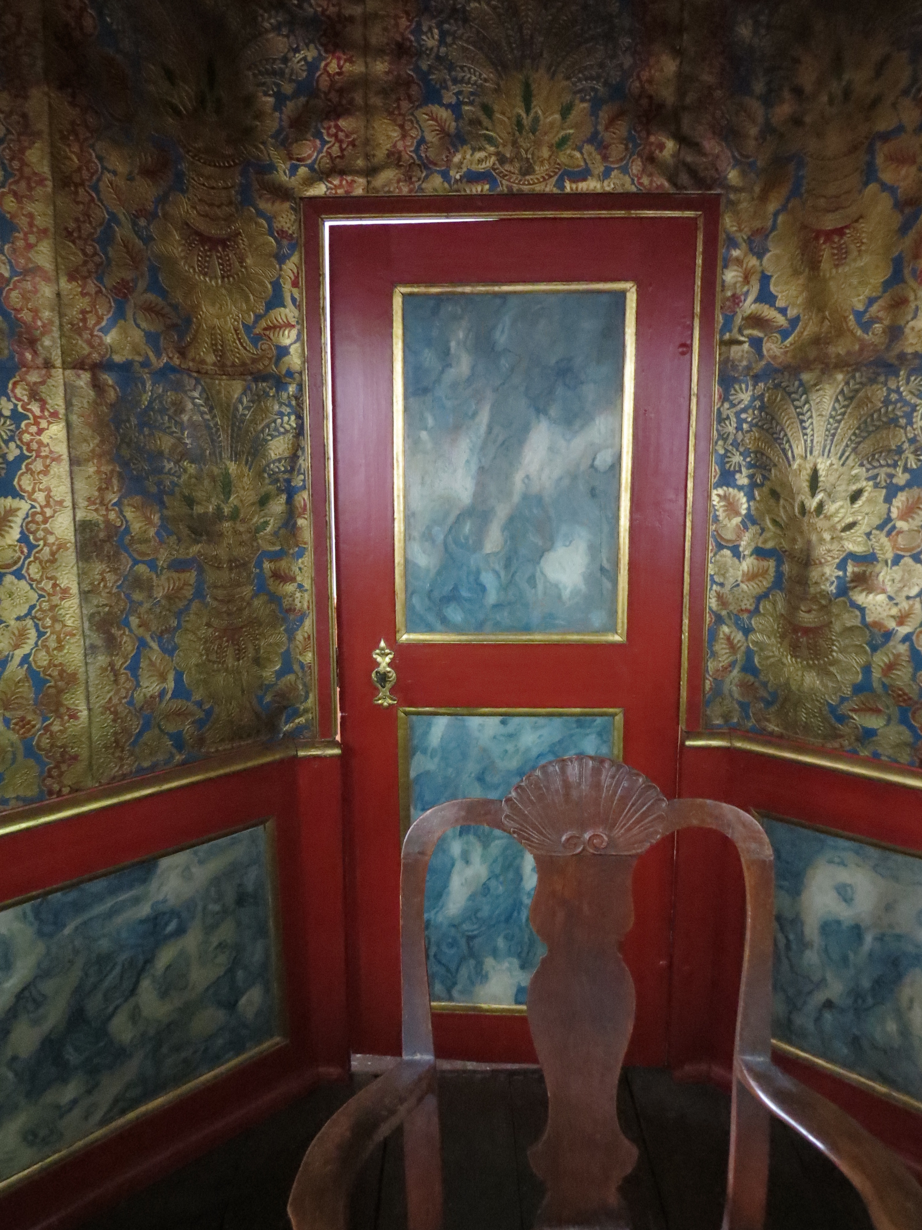 Dronningestolen i dronningelogen, Reformert Kirke, København